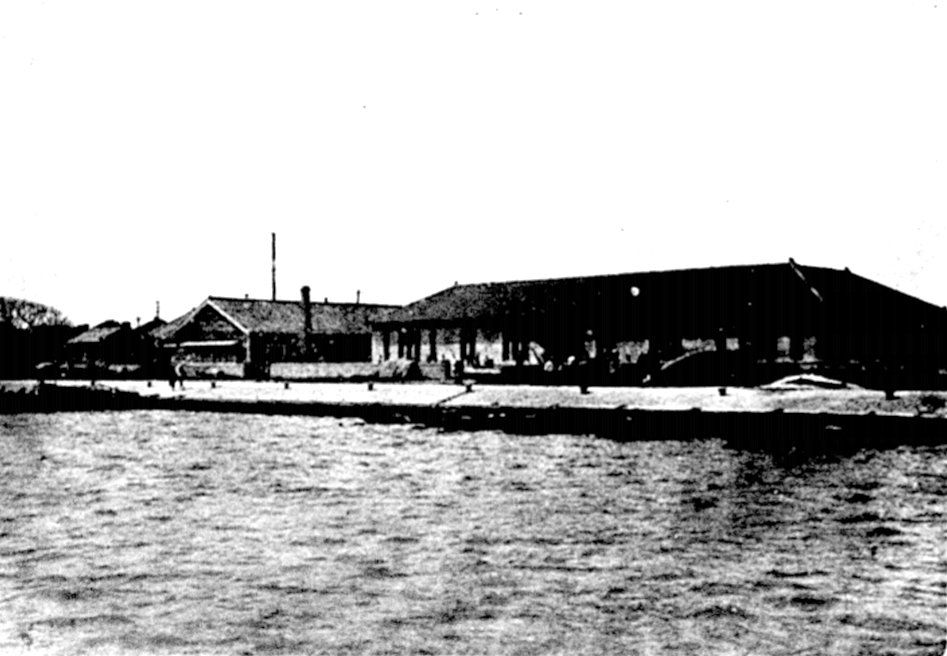 臺灣總督府水產試驗場基隆本場全景，位於基隆市社寮島